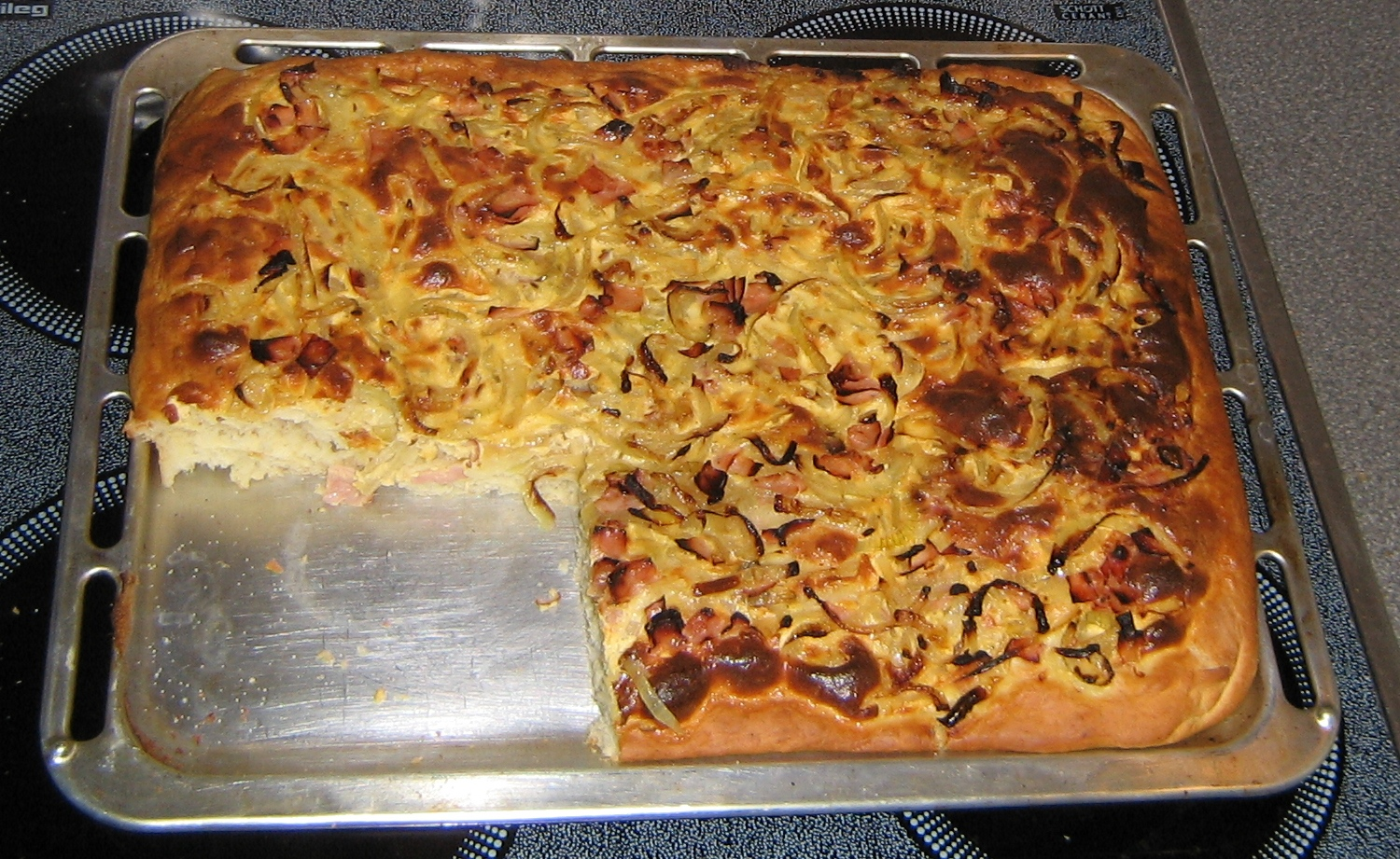 Zwiebelkuchen das Alu-Backblech sticht etwas hell heraus